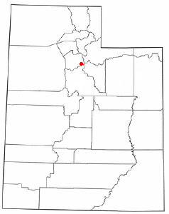 Localización de Alta, Utah